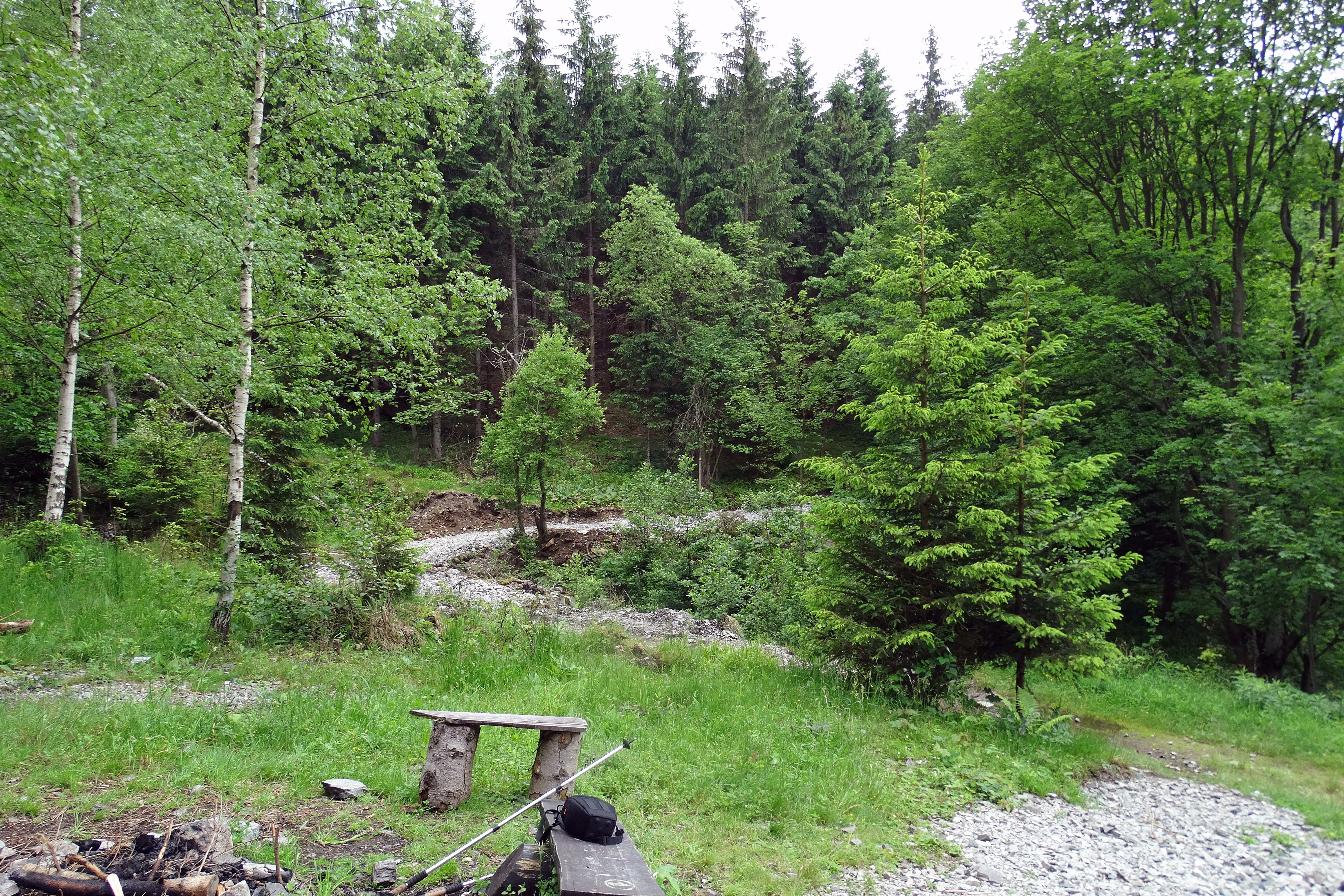 Budniki-widok ogólny